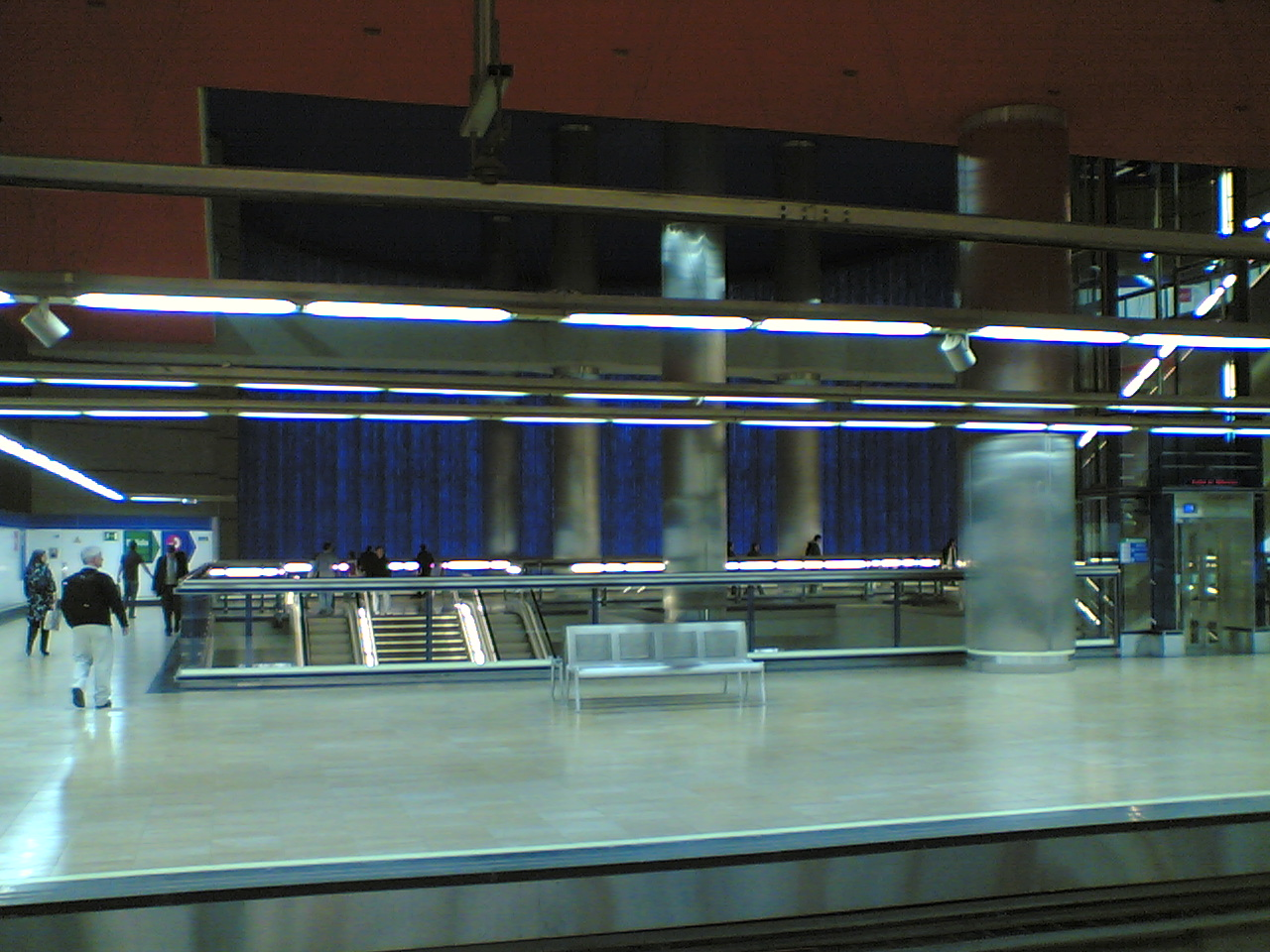 Nueva estación de metro de Chamartín en Madrid. New Metro Station of Chamartin in Madrid.